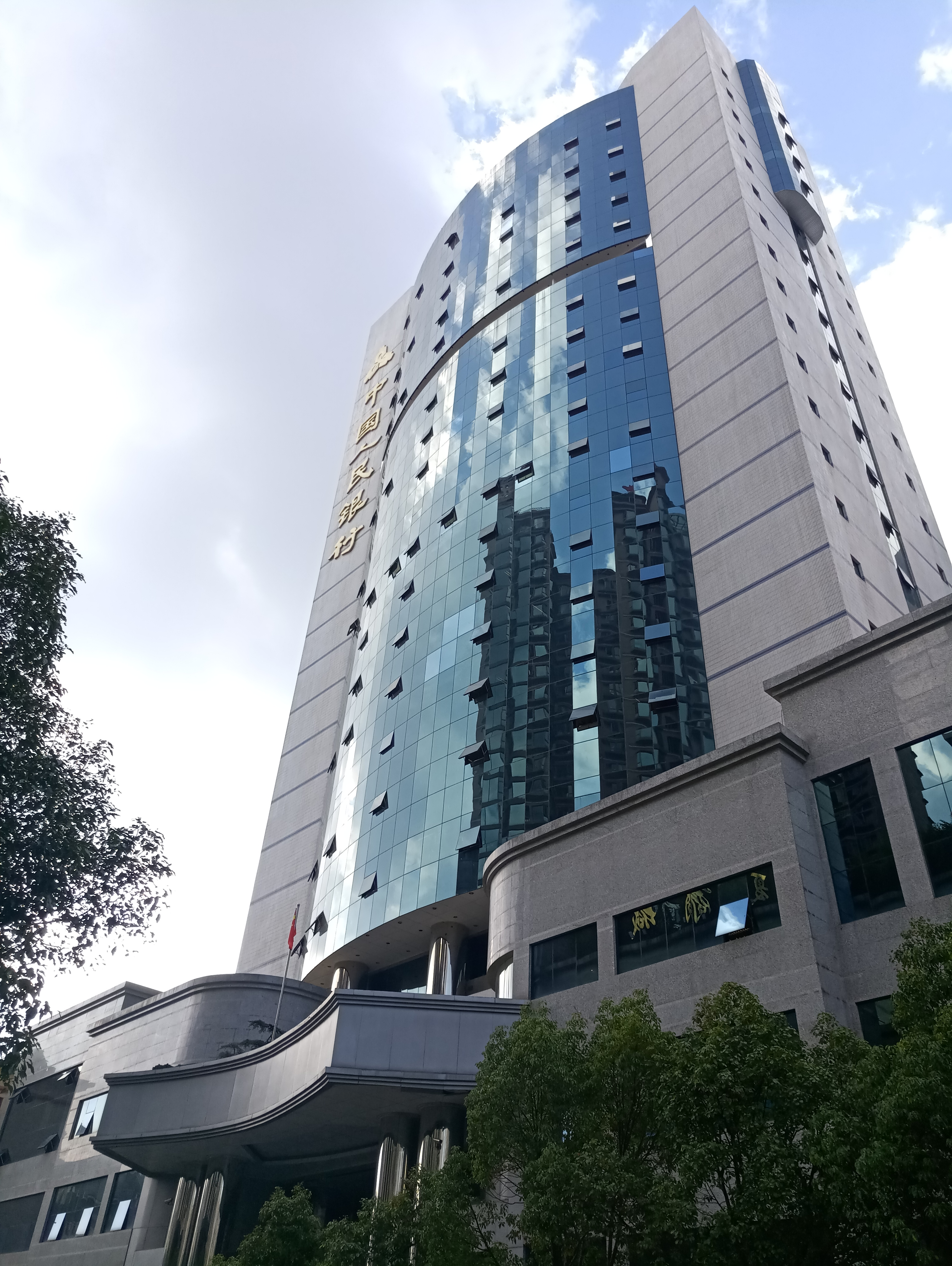 中文（中国大陆）: 中国人民银行昆明中心支行-主楼